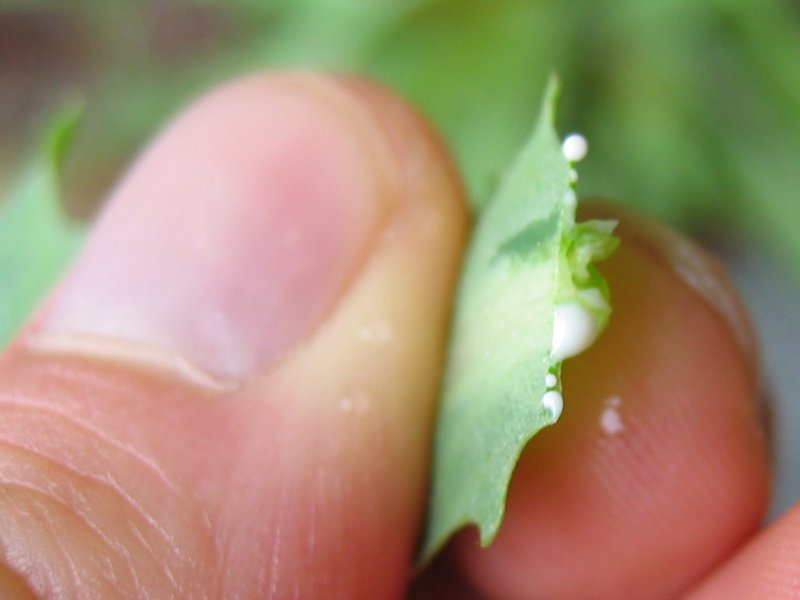 Tataren-Lattich Lactuca tatarica, Rügen